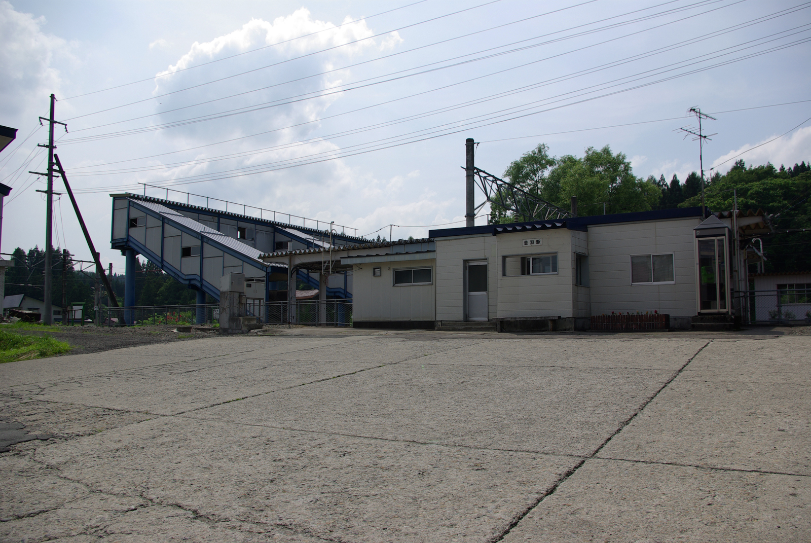 奥羽本線釜淵駅